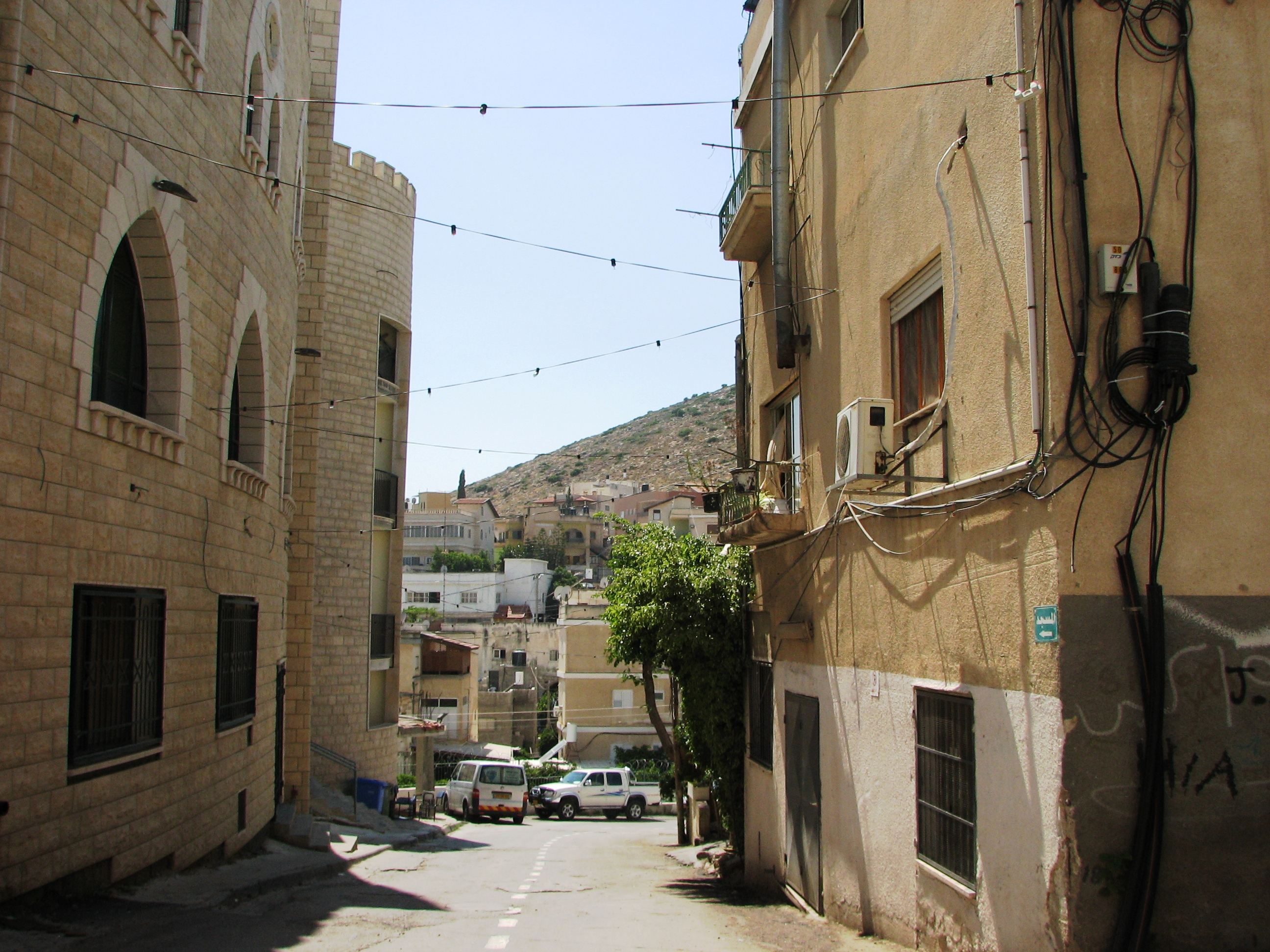 Tur'an, is an Israeli-Arab local council in the North District of Israel. It is located on Mount Tur'an near the main road from Haifa to Tiberias טורעאן, היא מועצה מקומית ערבית במחוז הצפון בישראל. היא הוכרזה כמועצה מקומית בשנת 1959., שוכנת על הר טורעאן על הדרך במובילה מחיפה לטבריה ליד צומת גולני בתי הכפר, משמאל מסגד אבו באקר סדיק שנבנה בשנת 2003